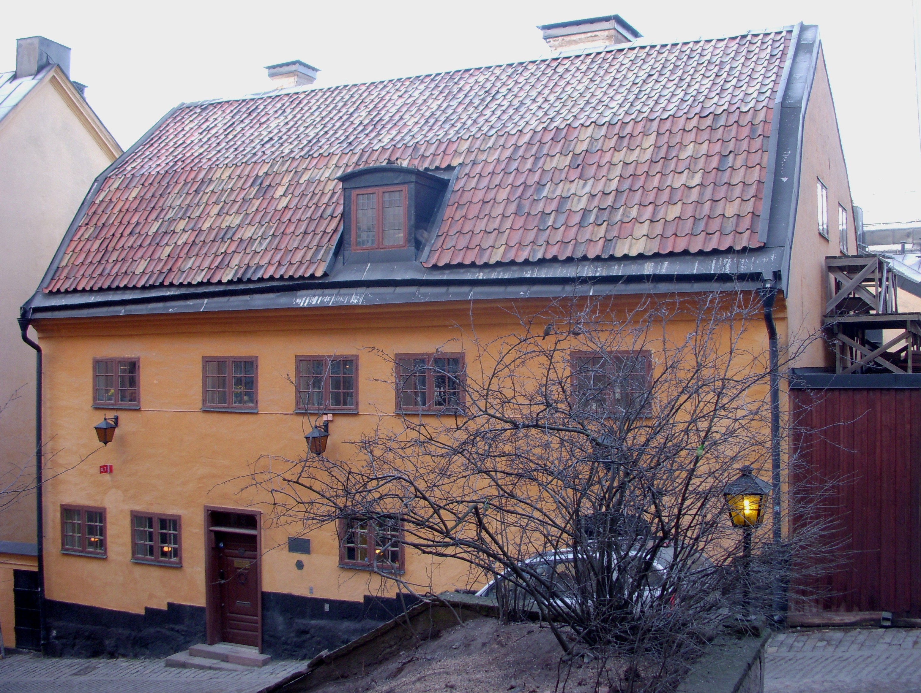 Bellmanhuset på Söder i Stockholm